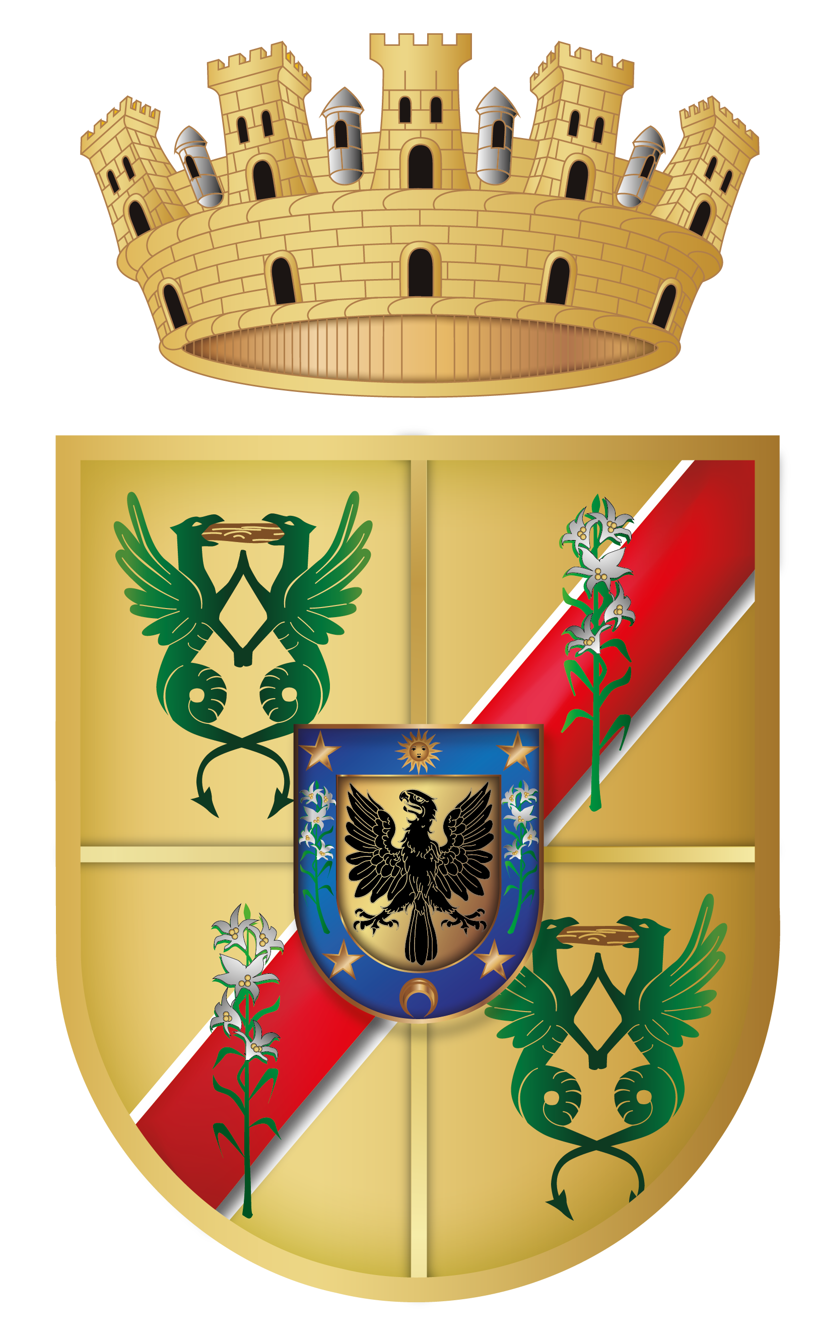 escudo heráldico de la comuna de Penco